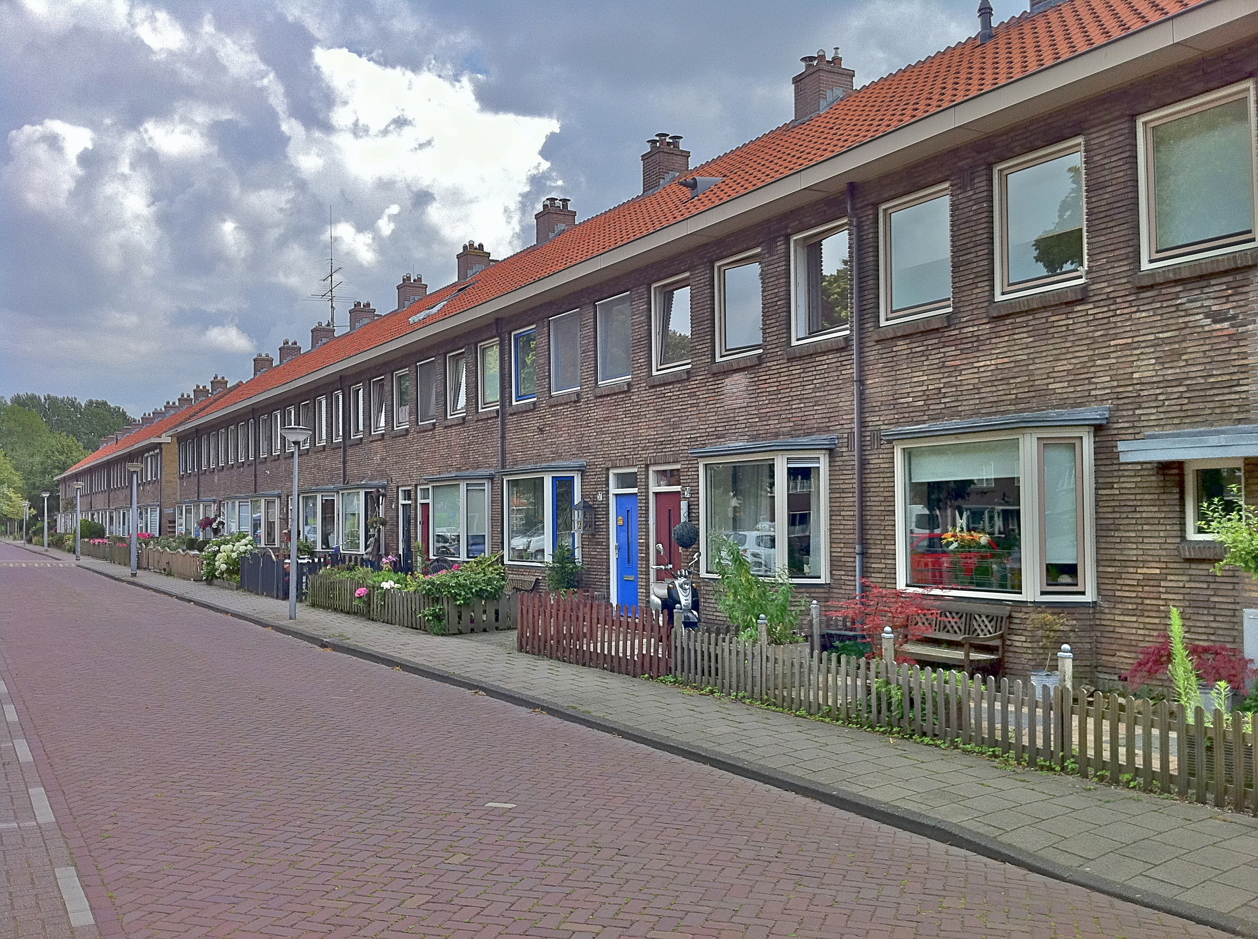 Meteorenweg zuidzijde, Tuindorp Oostzaan Amsterdam-Noord juli 2011. Gebouwd door de Algemene Woningbouw Vereniging, verhuurd door Stadgenoot.